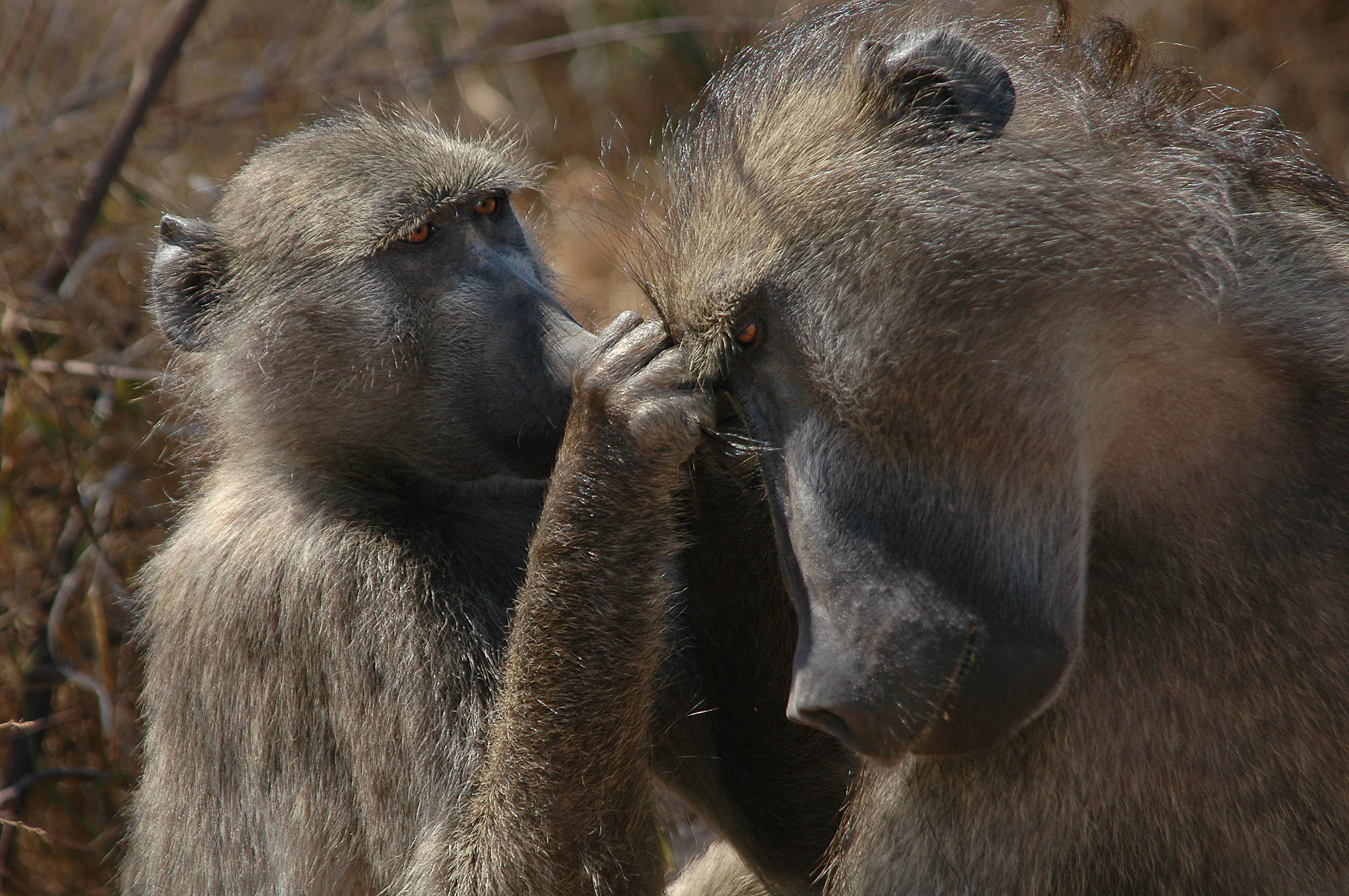 Baboons fotografiert im Krügerpark